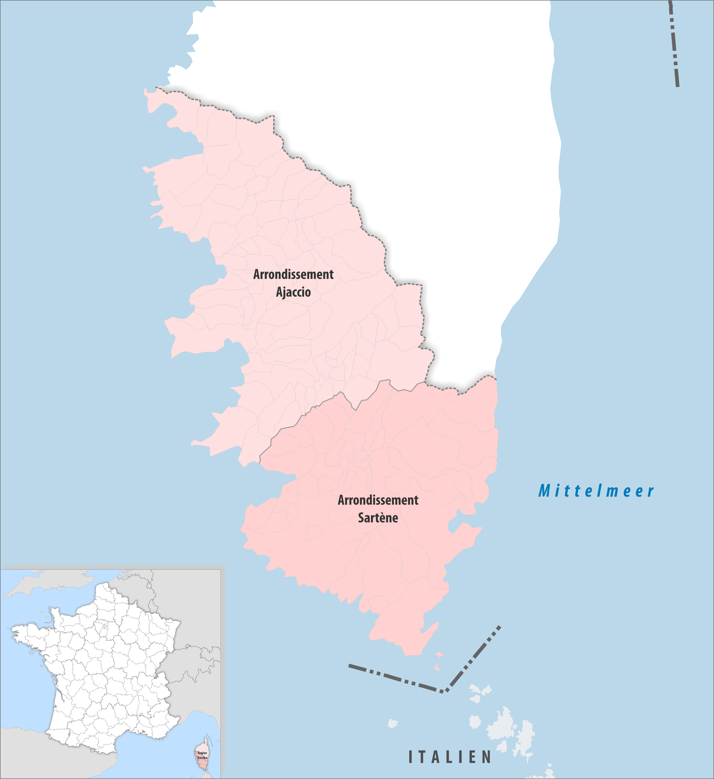 Gemeinden und Arrondissemente im Departement Corse-du-Sud